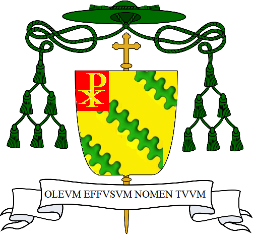 Stemma del vescovo Luigi Belloli, vescovo di Anagni-Alatri (1987 - 1999)